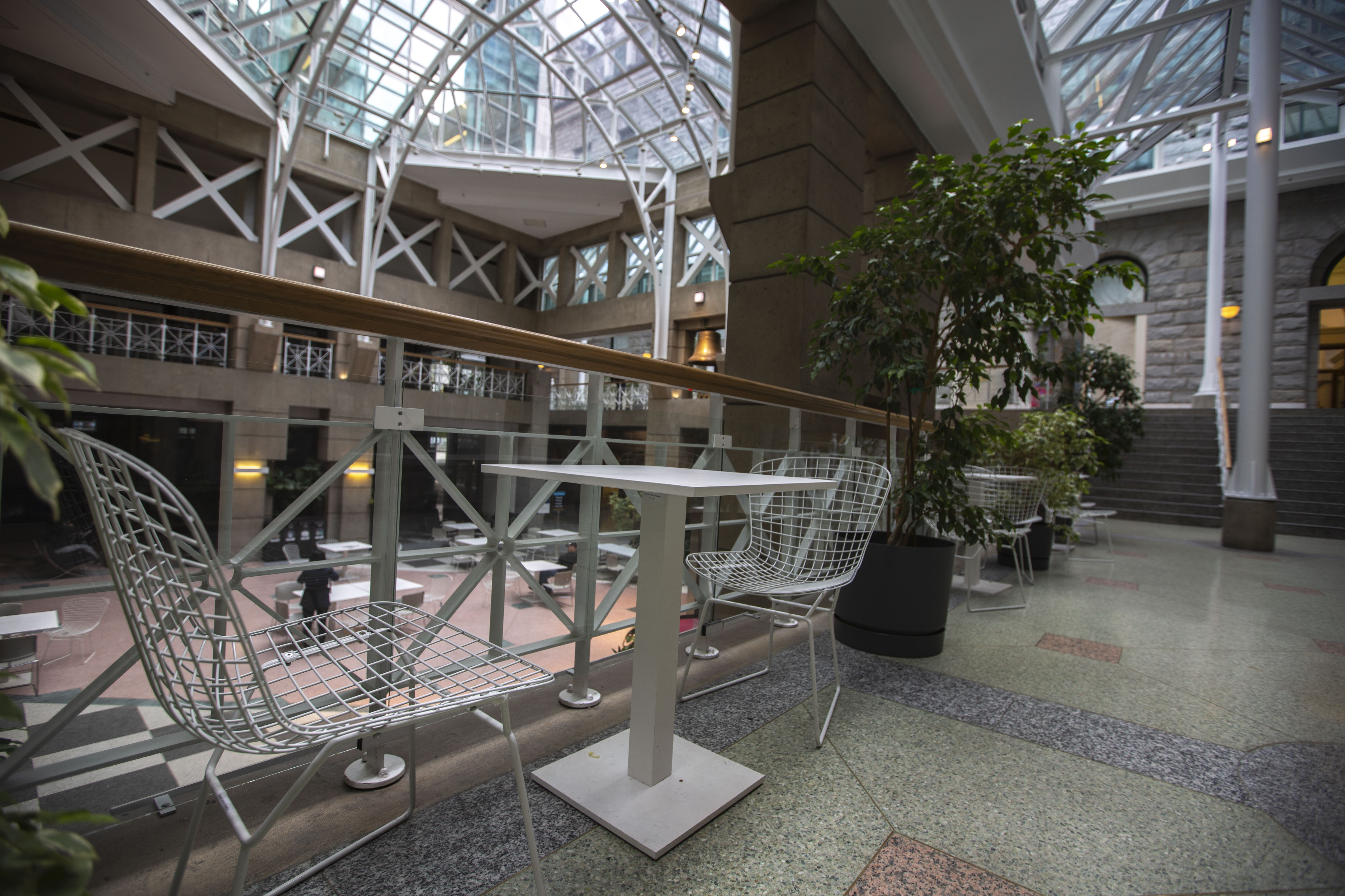 Sinclair Centre